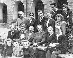 Група викладачів і випускників Ленінградського університету